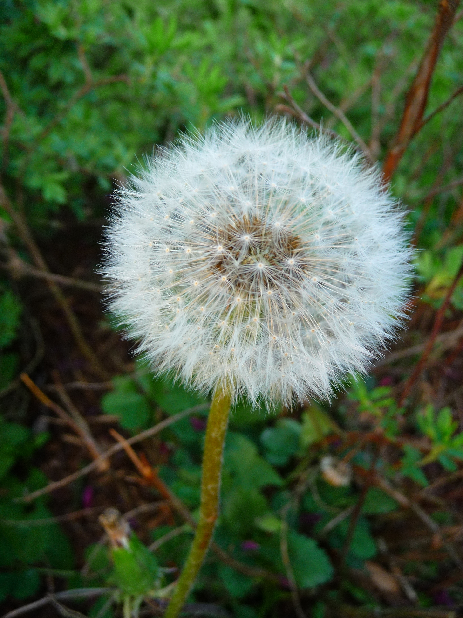 Pusteblume - der mit Früchten besetzte Kopf des Gewöhnlichen Löwenzahns (Taraxacum sect. Ruderalia)